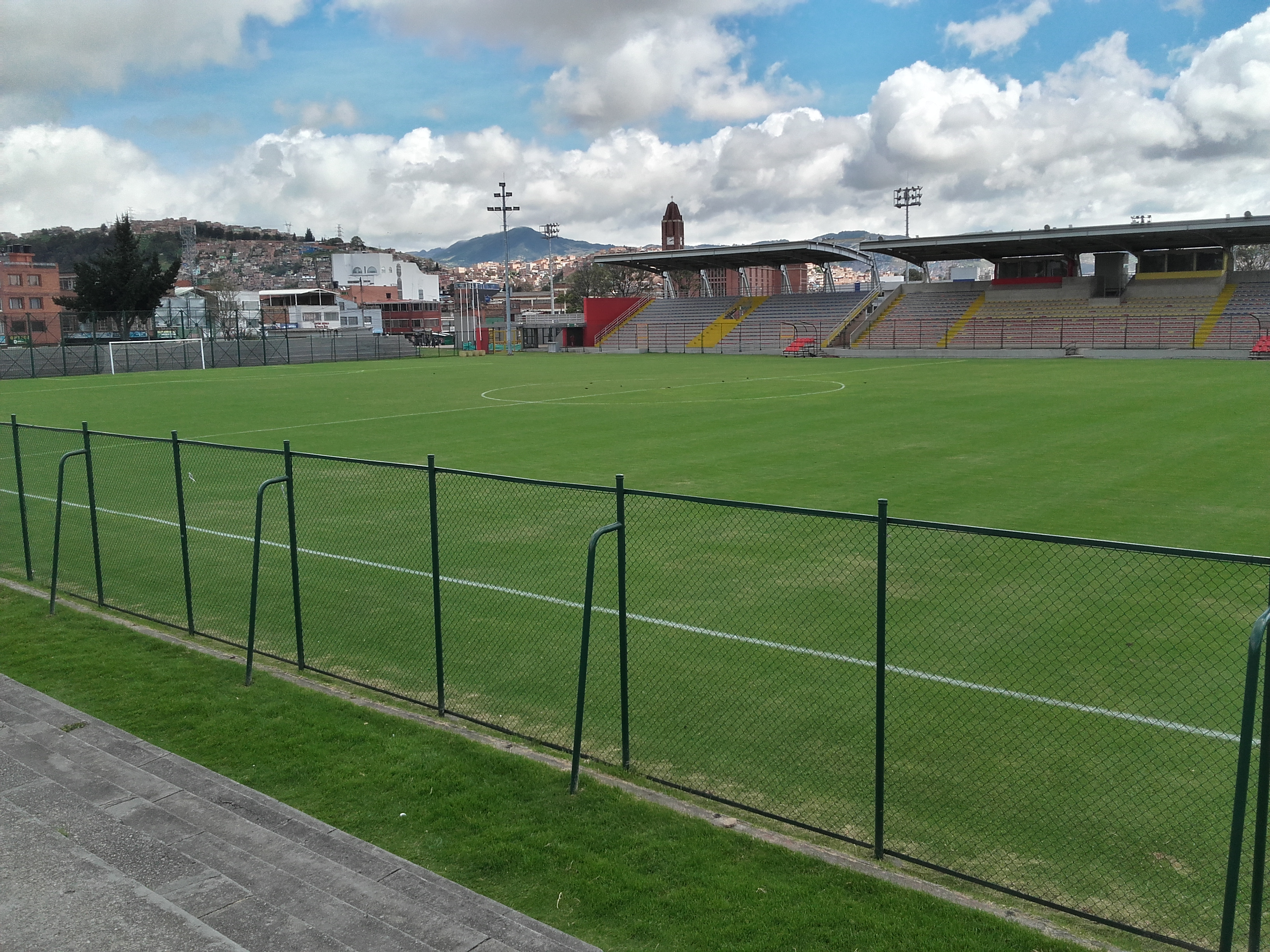 djkdfnkdkf